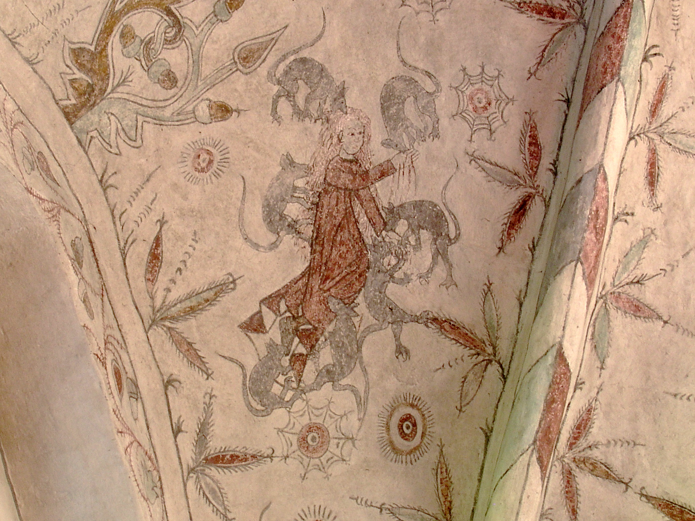 Kaga kyrka / Kaga church. Linköping, Sweden. Kaukilla.